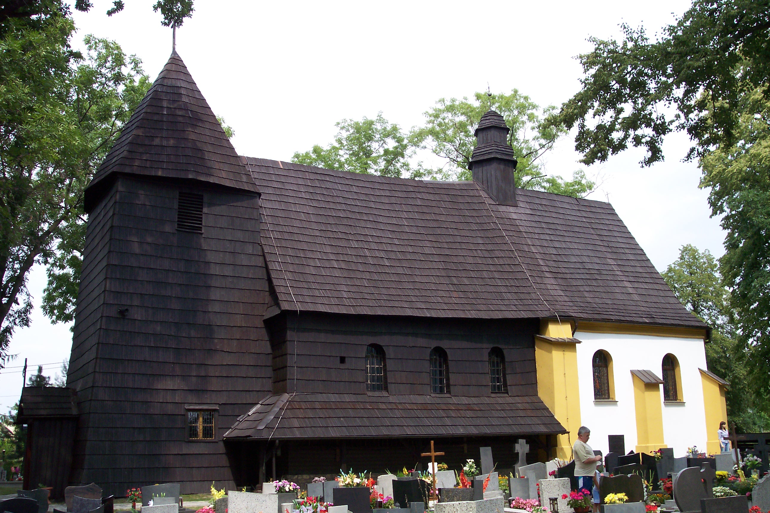 Kościół Świętej Trójcy w Rachowicach